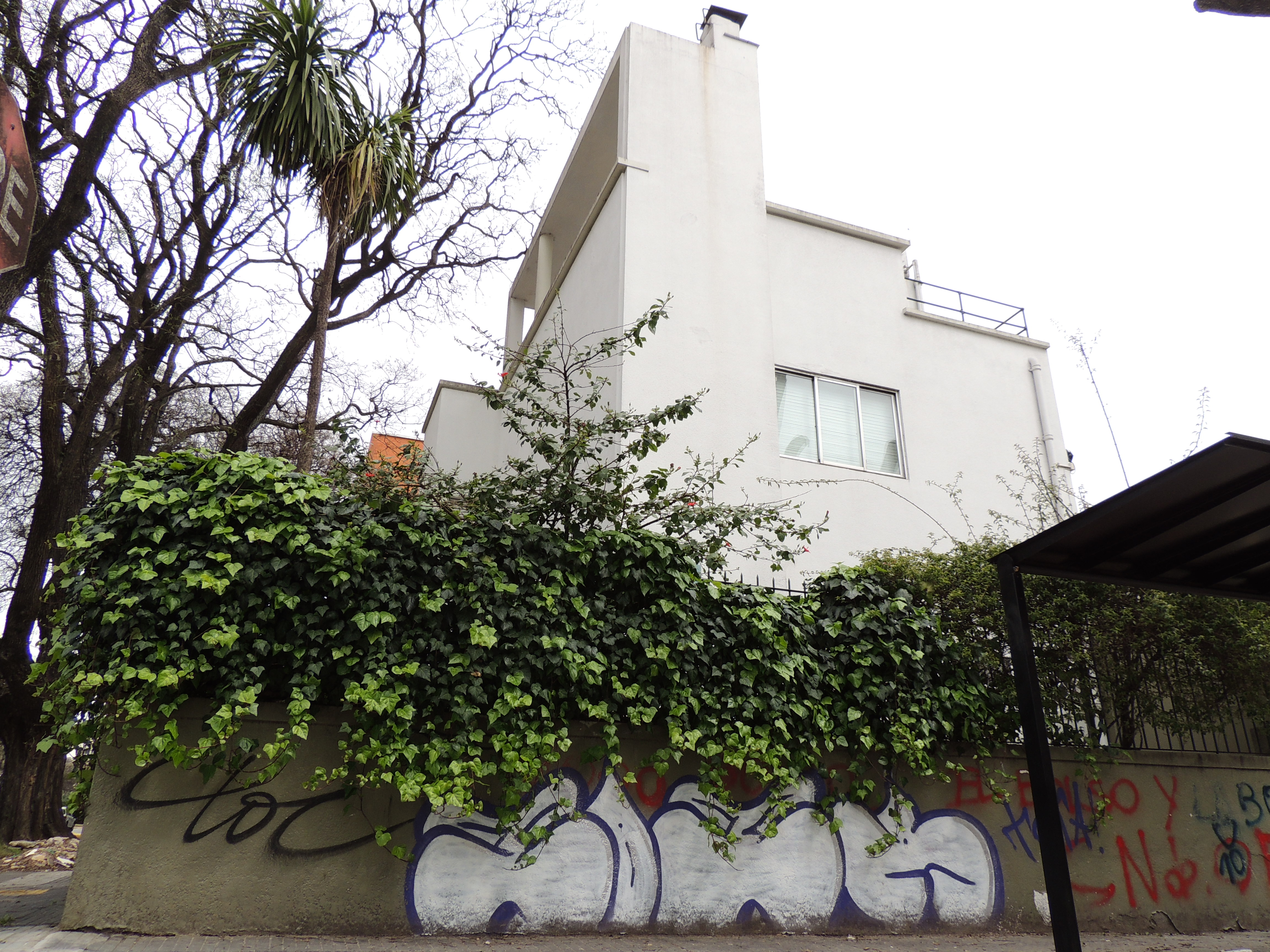 Vivienda Valerio Souto. Ubicada en el departamento de Montevideo